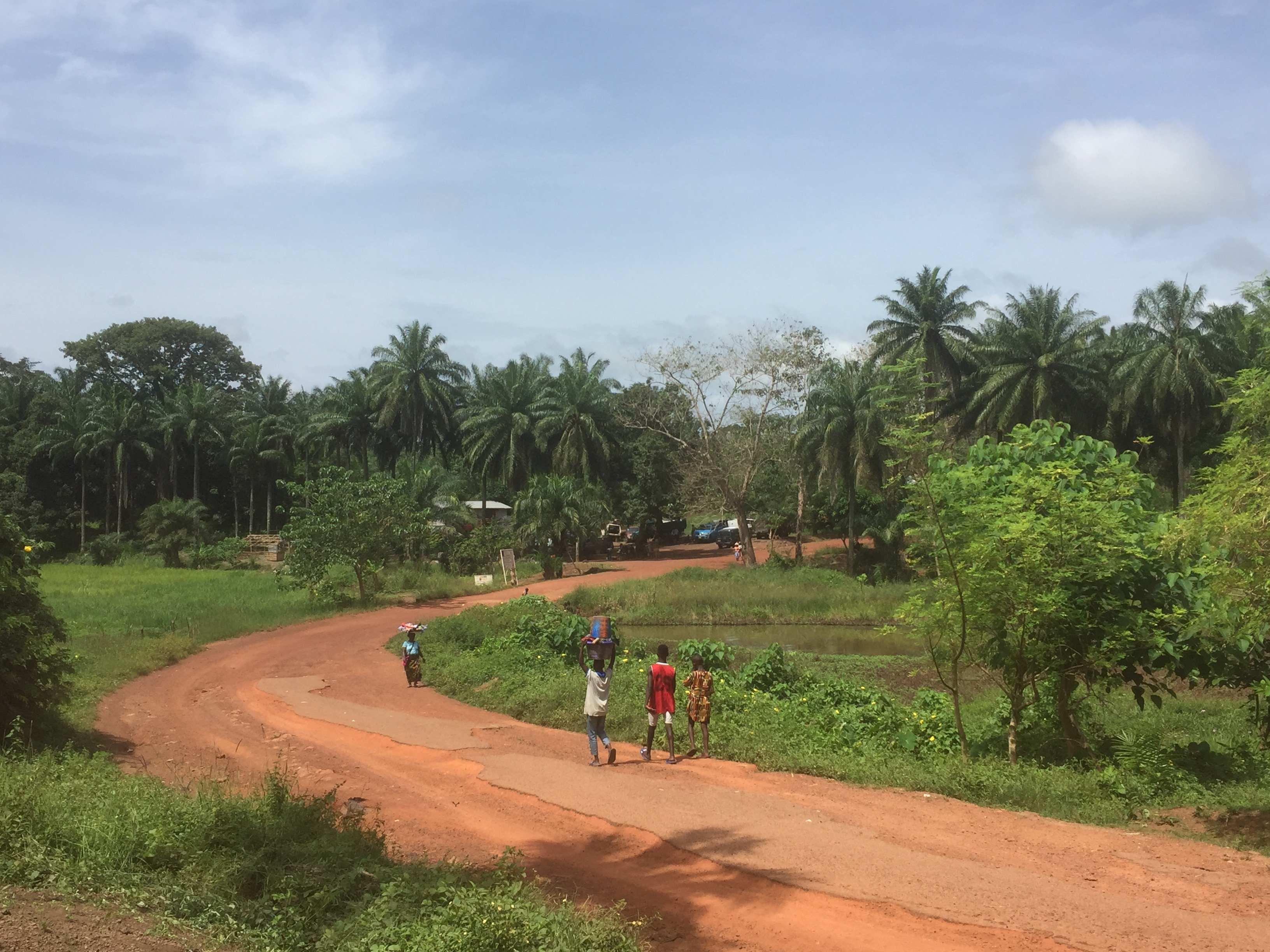 Street in Kamakwie / Sierra Leone, Westafrica